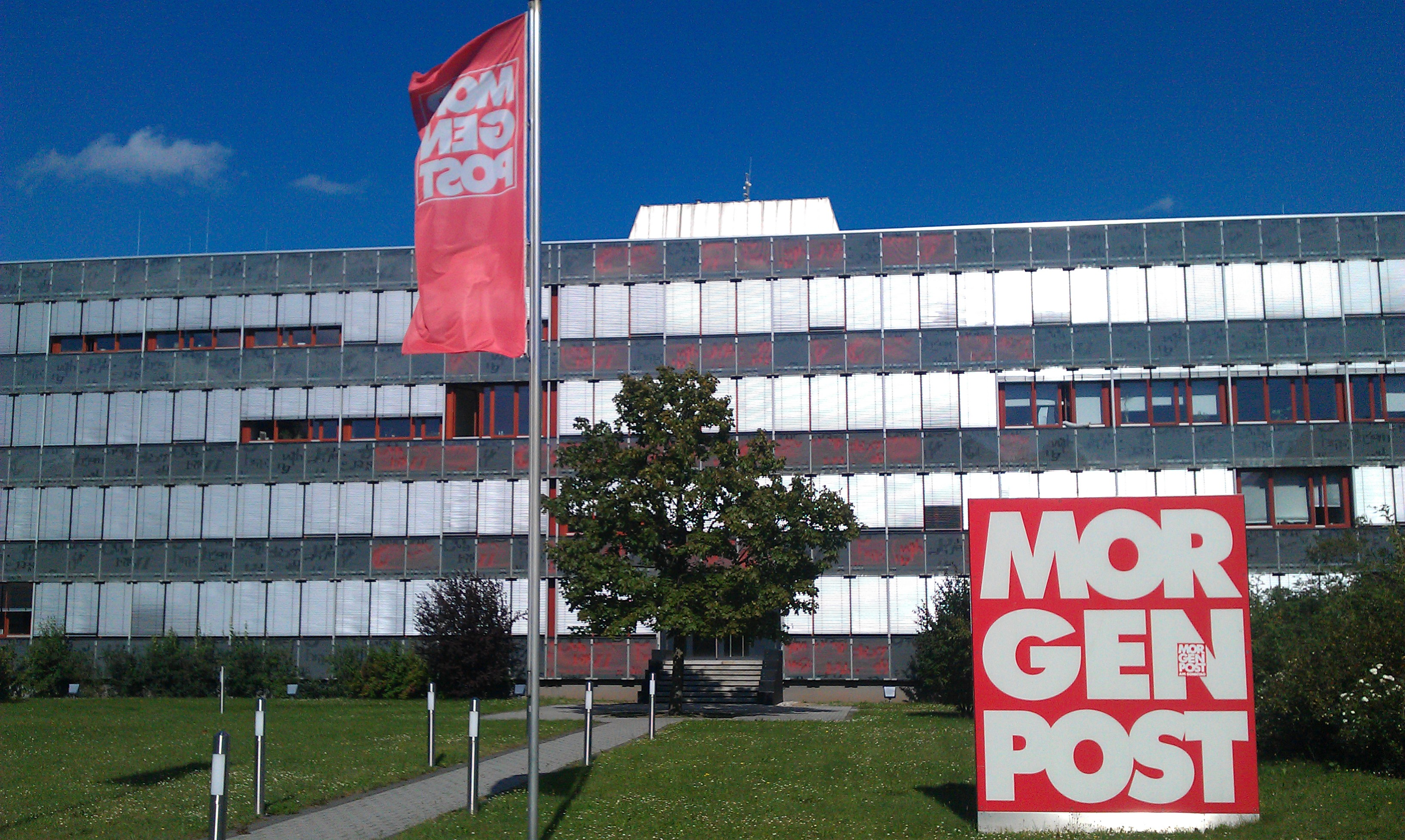 Morgenpost Gebäude in Dresden, Ostra-Allee